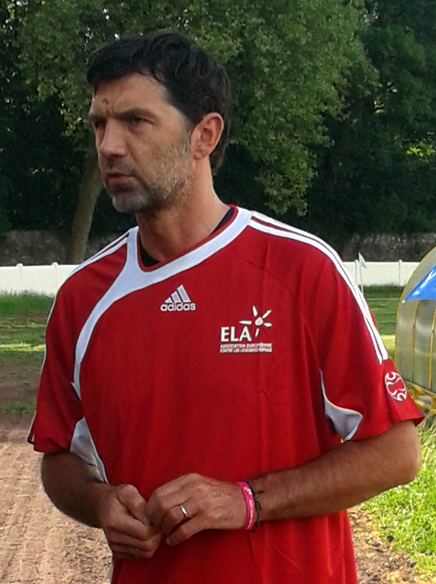 Éric Sikora en 2013.